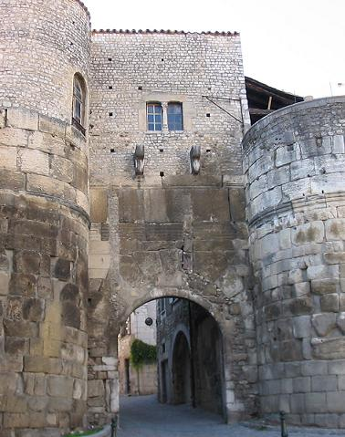 Ville de Die, Porte Saint Marcel